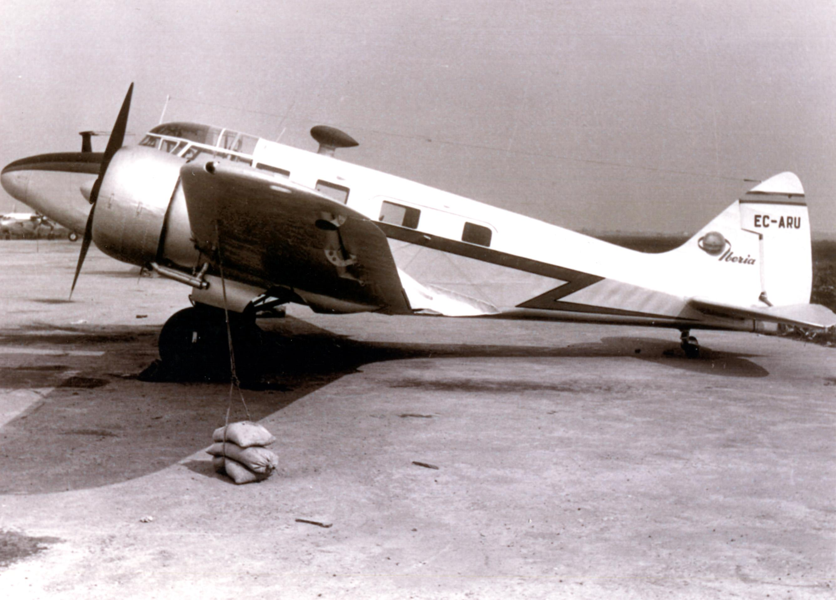 EC-ARU